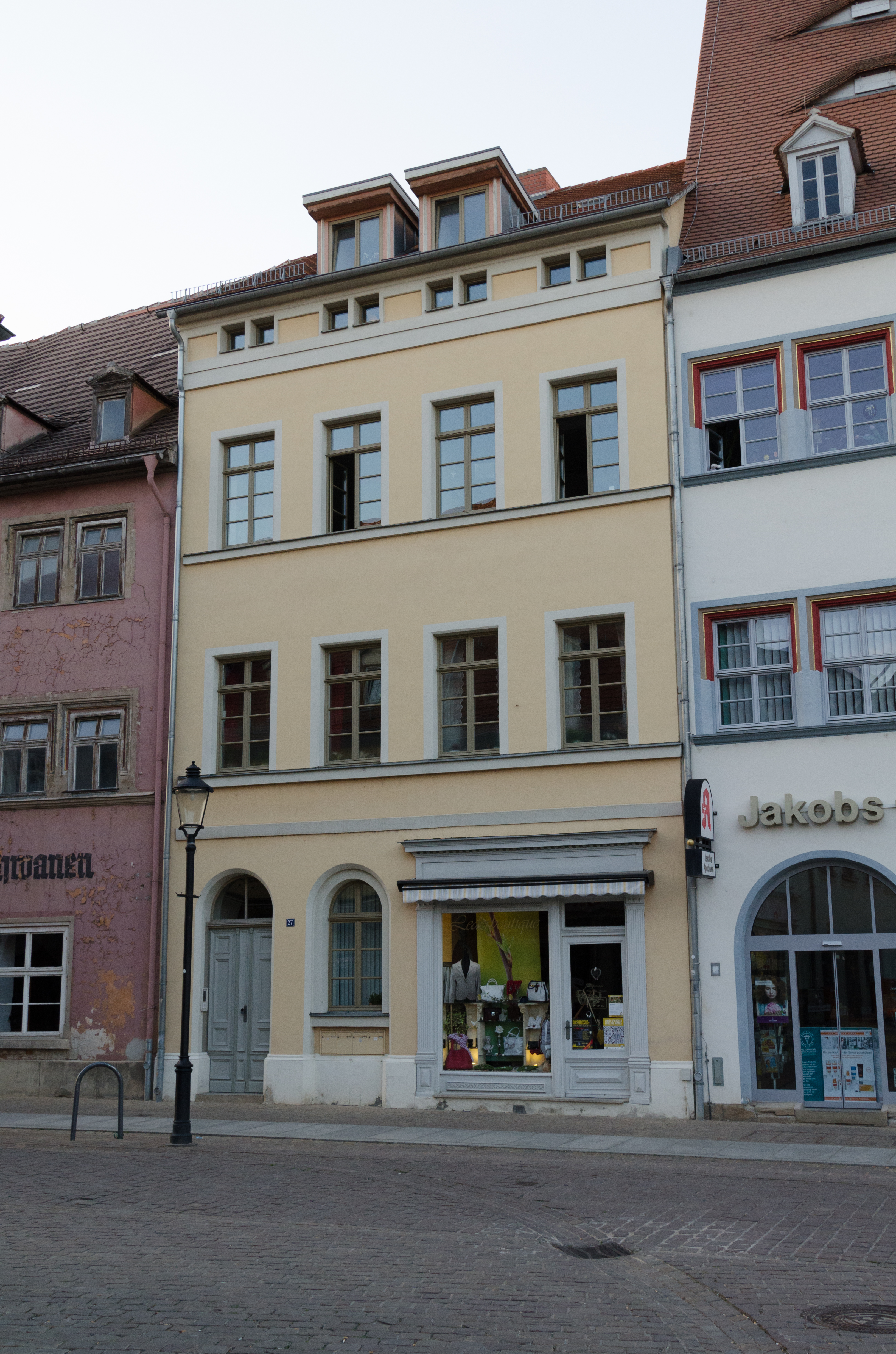 Naumburg, Jakobstraße 27